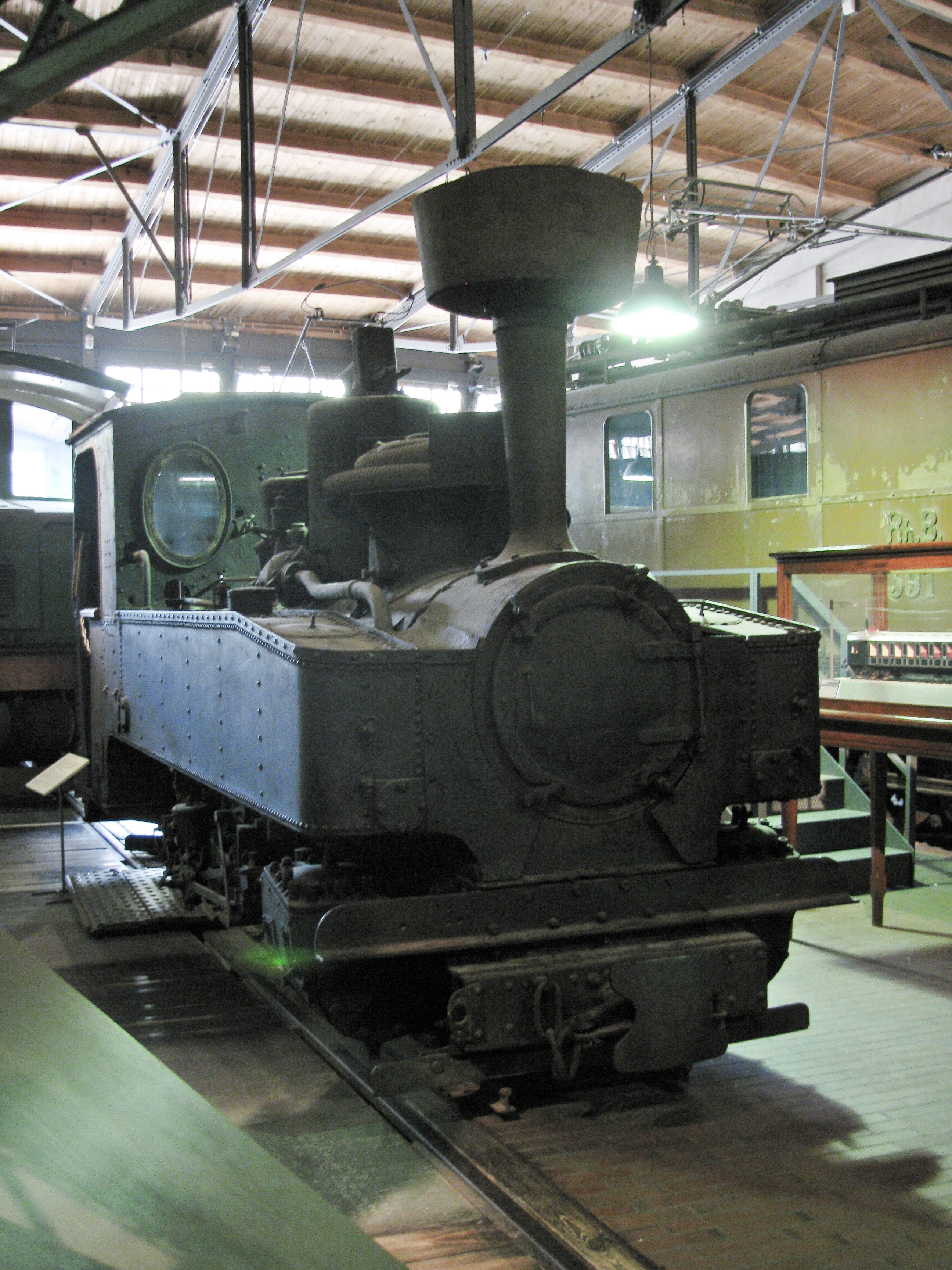 Schmalspurlok der Eisenbahnbrigade von 1918/19 im Deutschen Technikmuseum Berlin. Weitere Angaben auf Wunsch beim Uploader erfragbar.